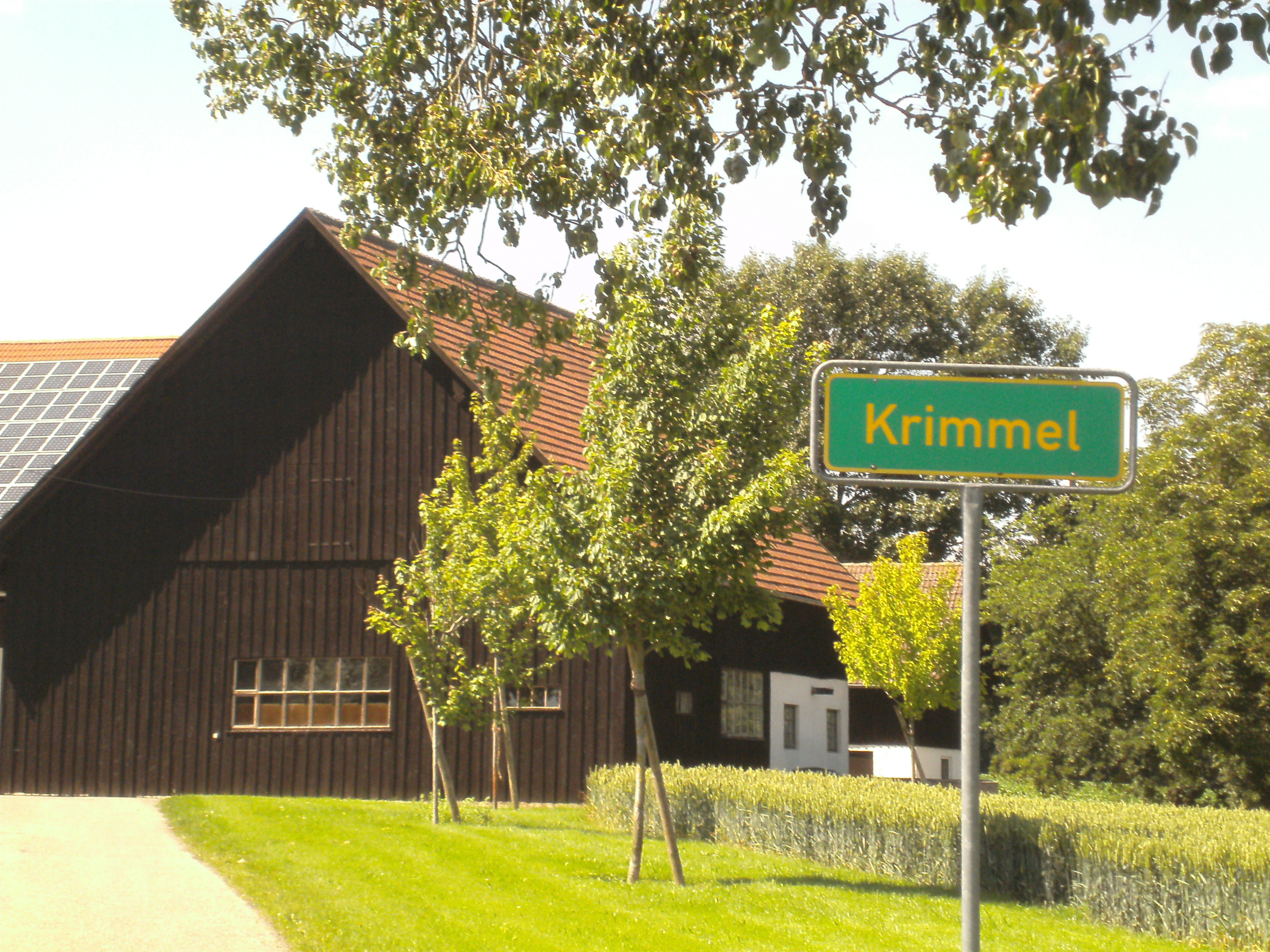 Krimmel [1]